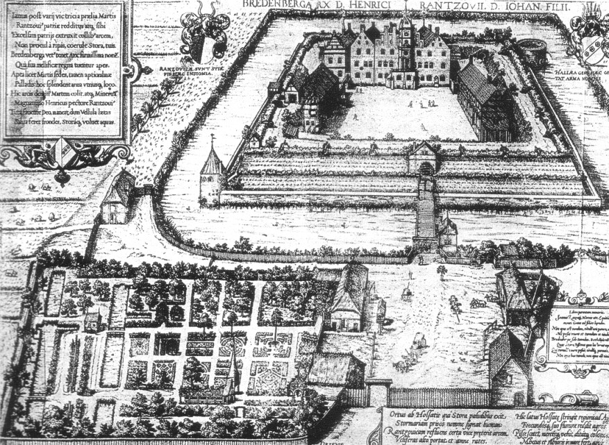 Das von Johann Rantzau errichtete Schloss Breitenburg in einem Kupferstich von 1590